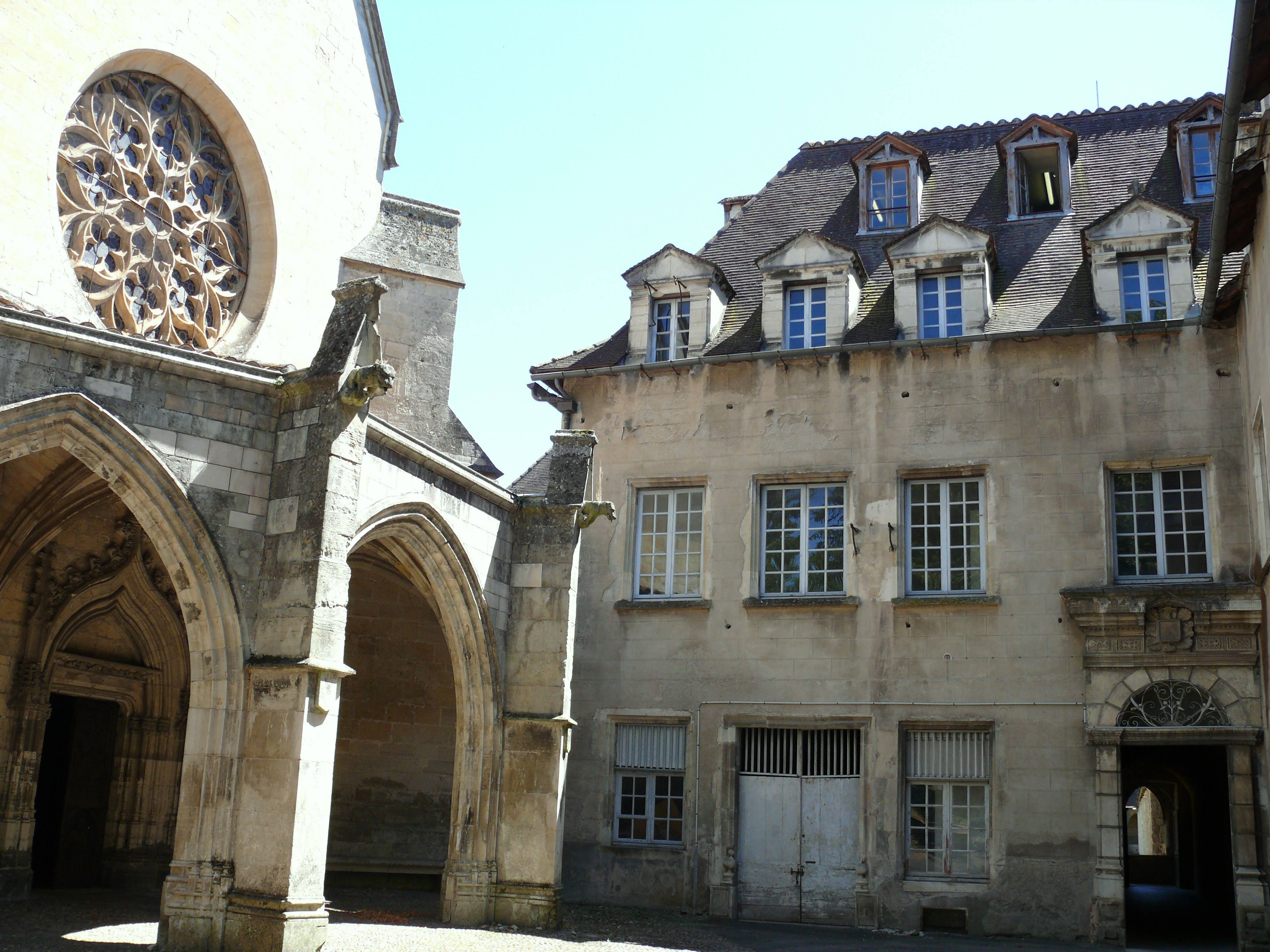 Villefranche-de-Rouergue - Chartreuse Saint-Sauveur - Hôtellerie